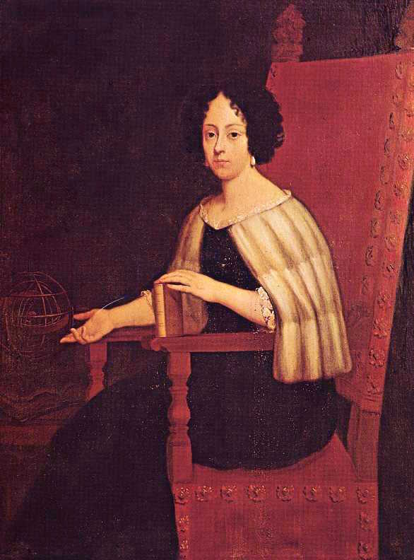 (sec. X, Milano. (book : F. L. Maschietto, Elena Lucrezia Cornaro Piscopia (1646-1684).